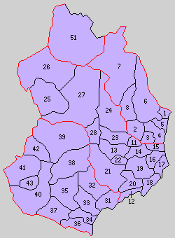 福島県石城郡の町村。